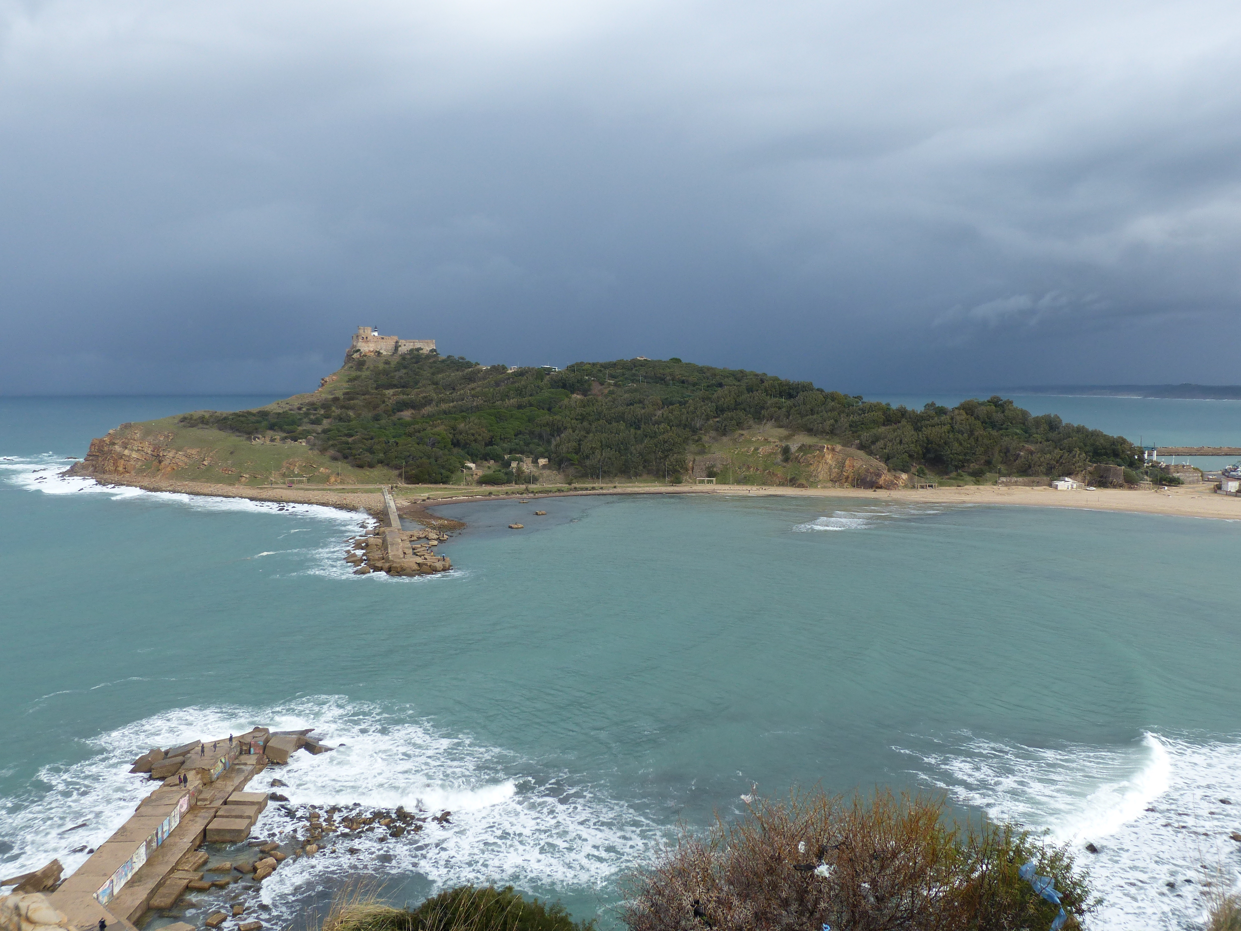 Ville de Tabarka au nord ouest de la Tunisie